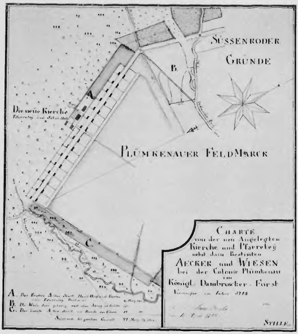 Karte Plümkenaus in Oberschlesien von 1788.